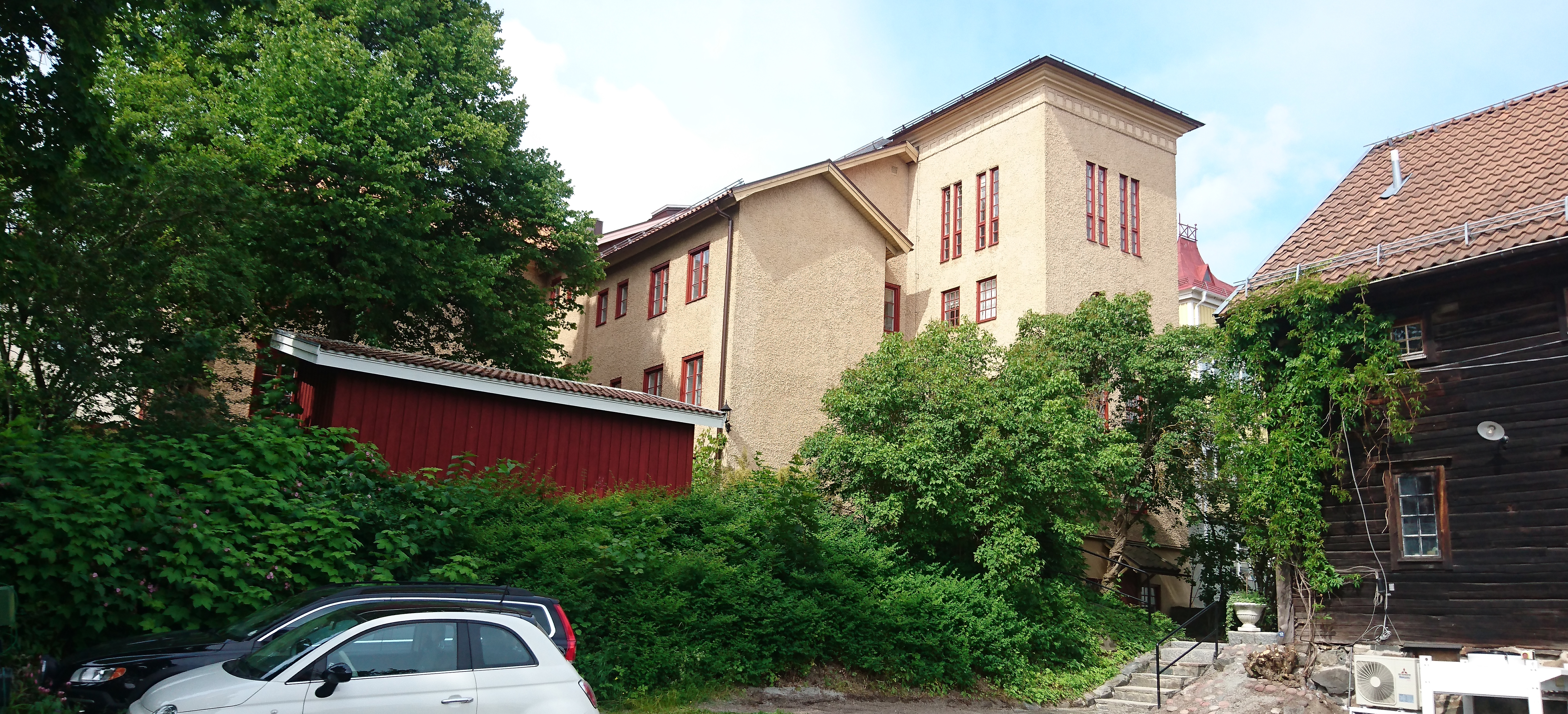 Elsborgs Slott, Falun, Sverige.